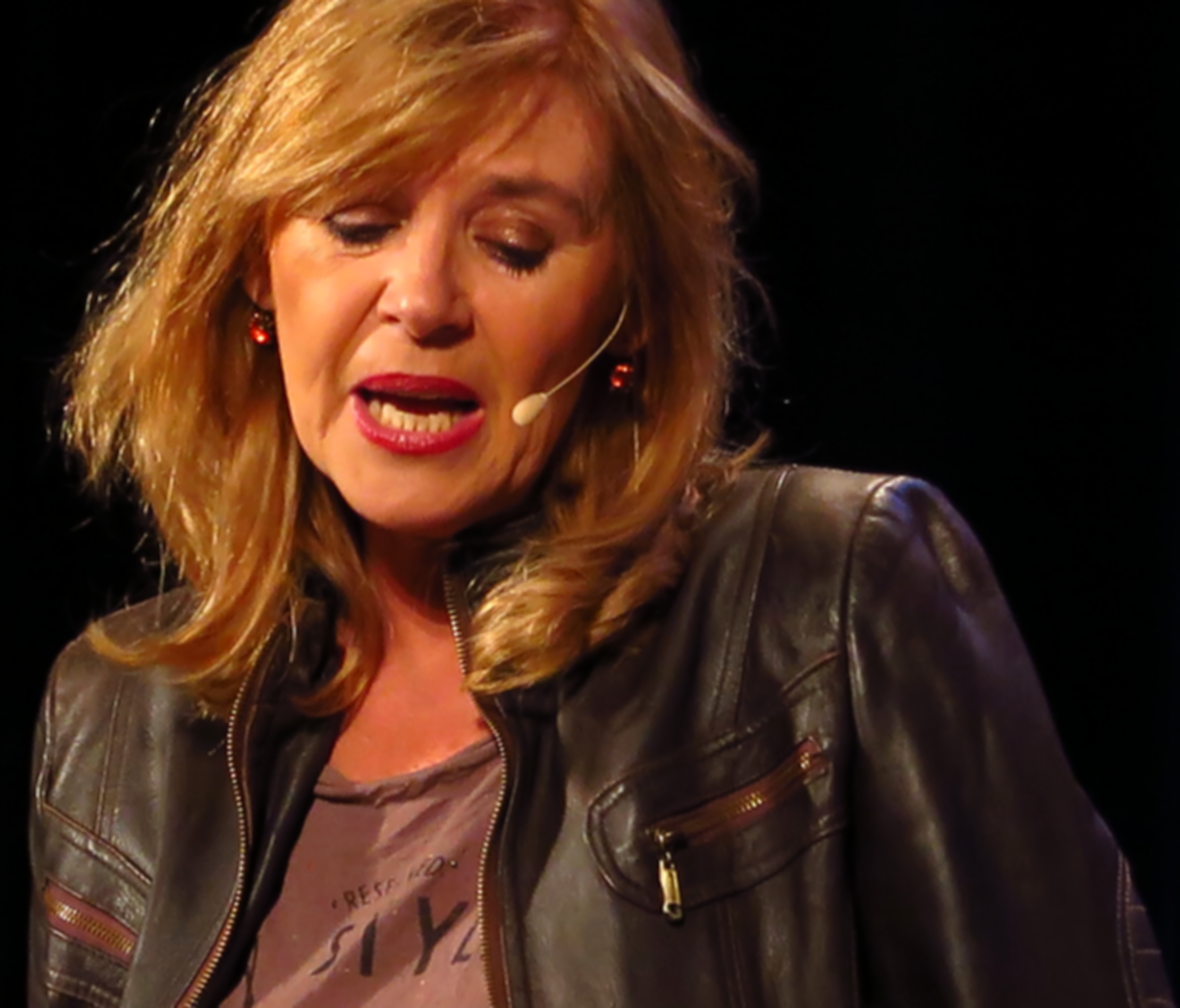 Deutsche Kabarettistin, Angelika Beier im April 2015 bei ihrem Programm "Zwischen Sex und Sechzig" im Casinotheater in Haar